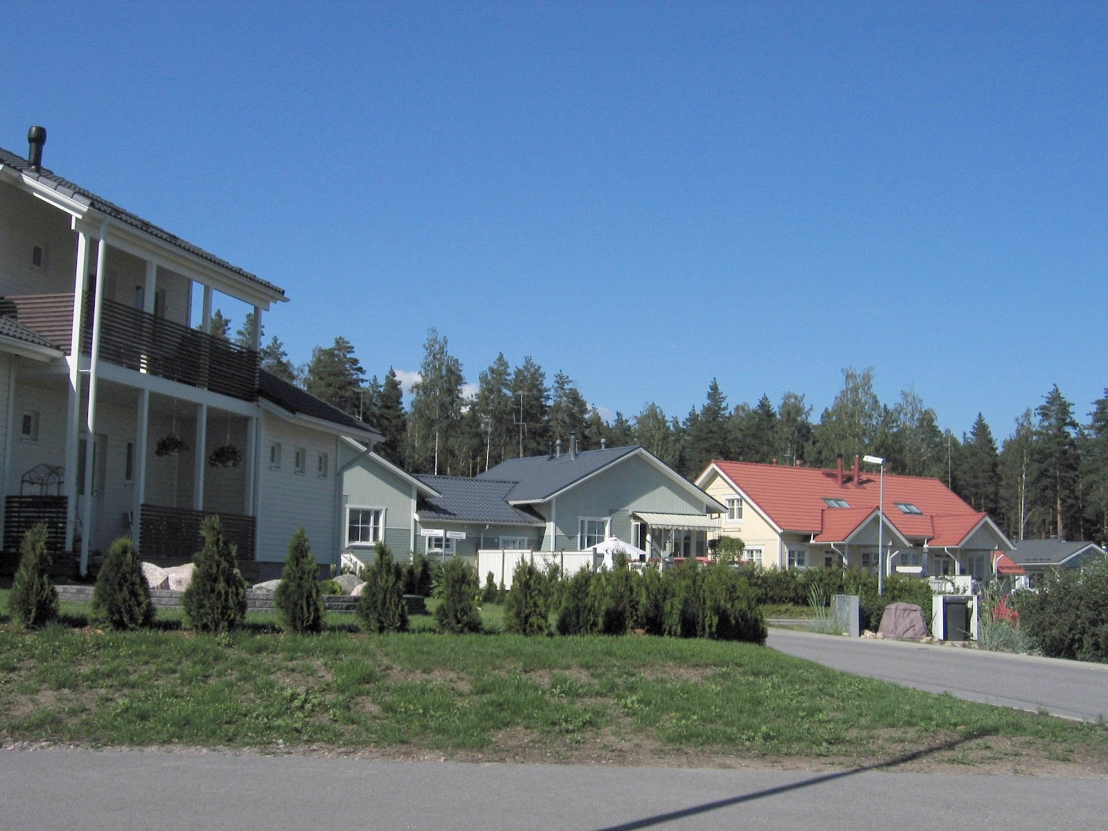 Ylästö district in Vantaa, Finland